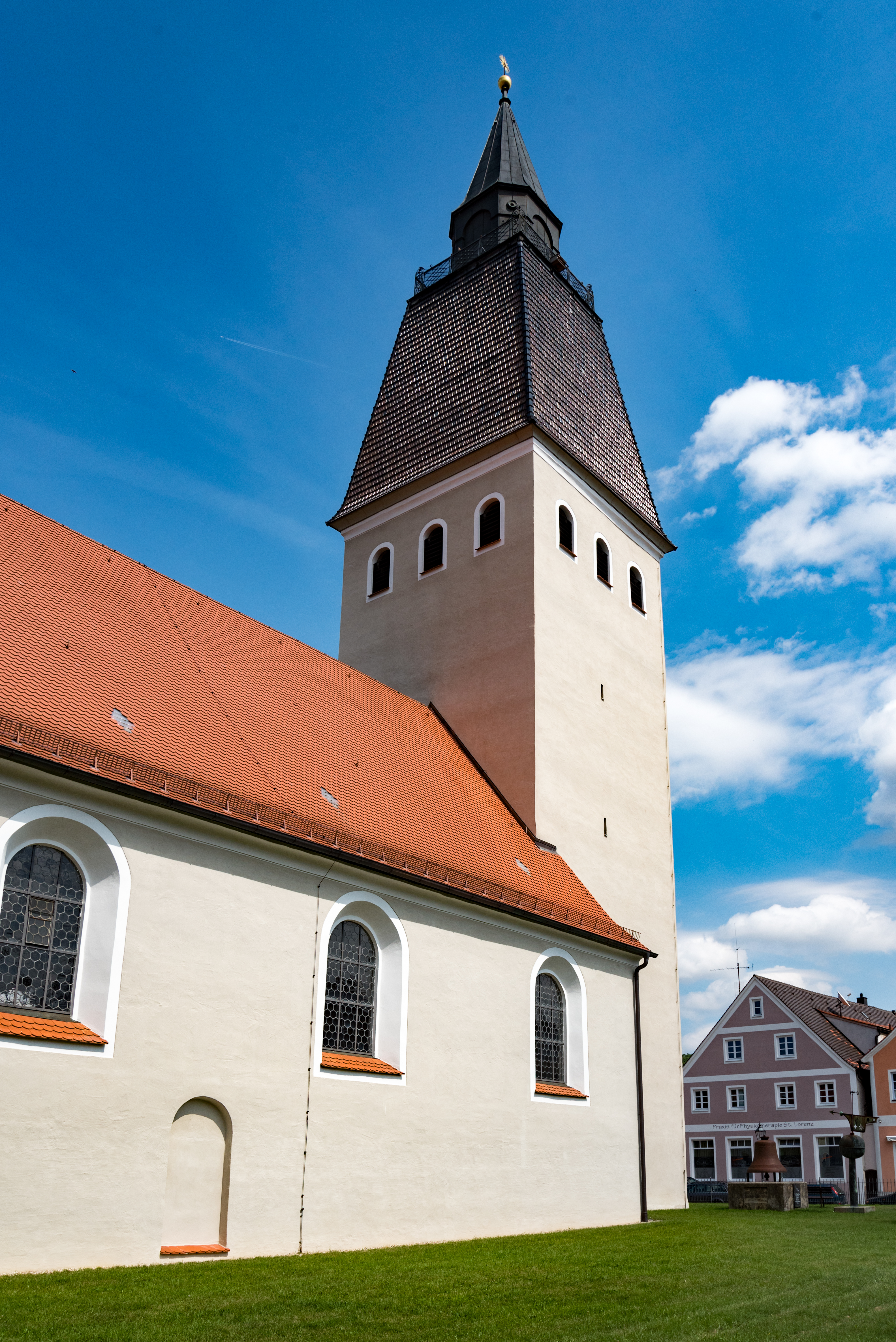 Berching, St.-Lorenz-Straße 2, Kirche St. Lorenz